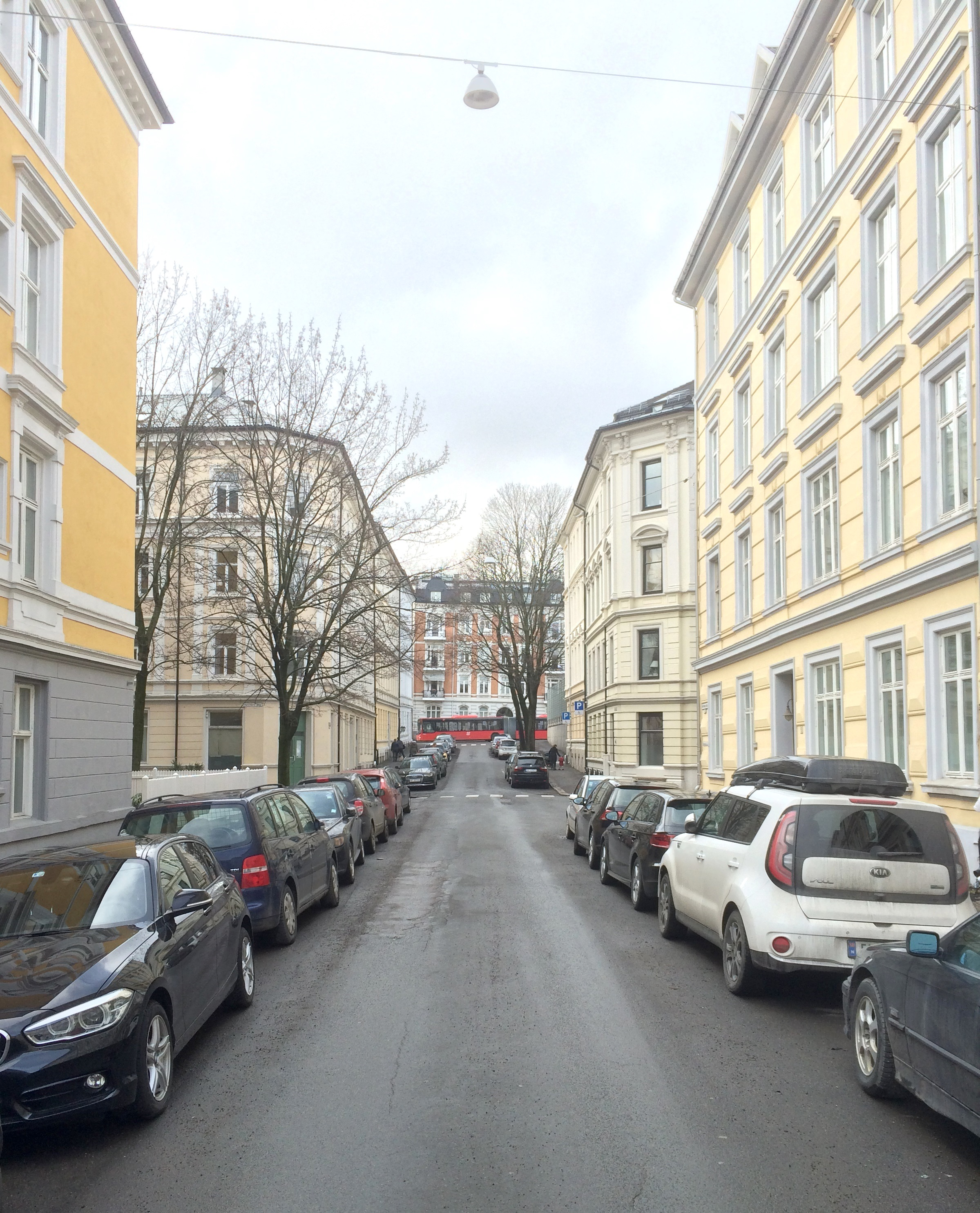 Reichweins gate vestover